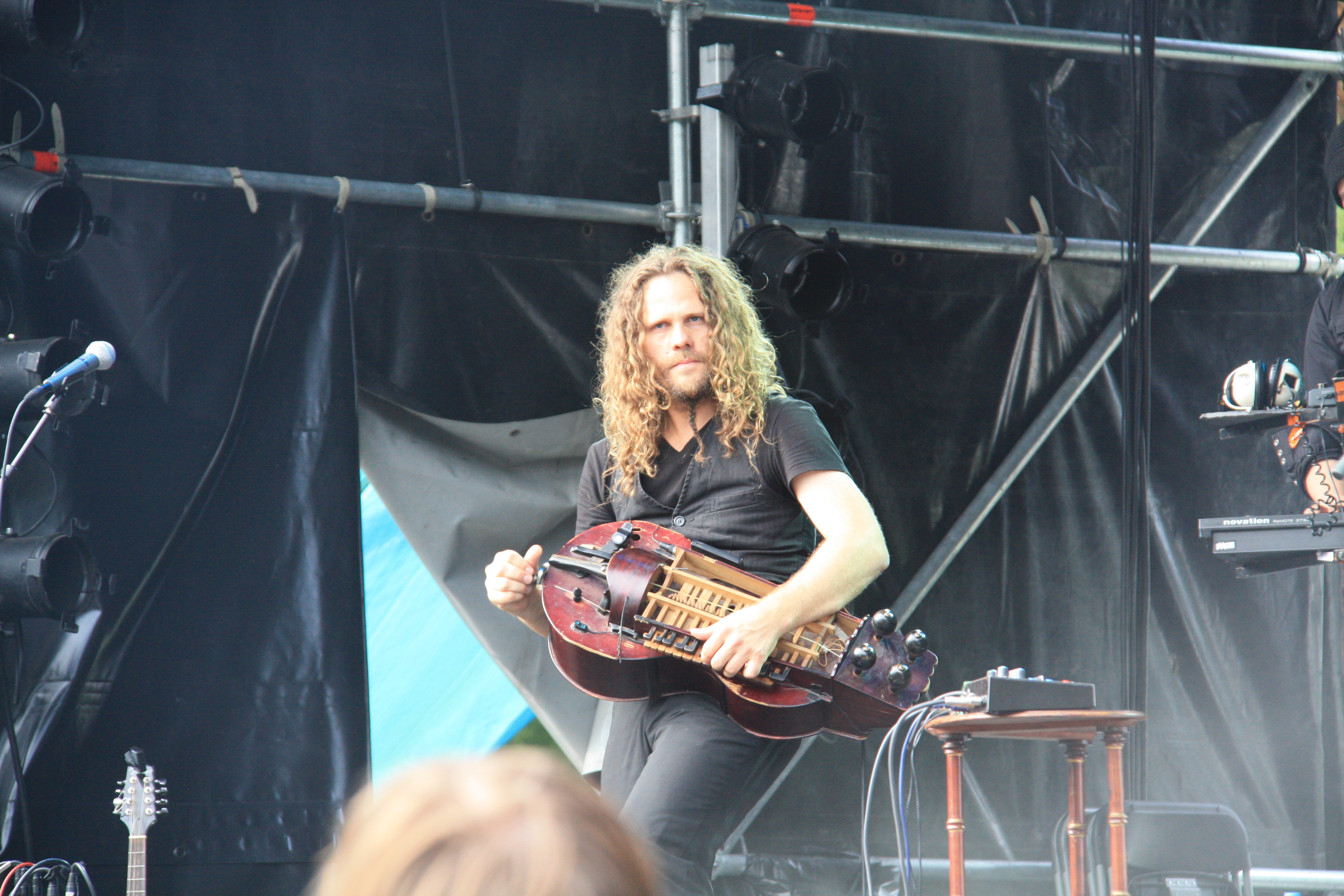 Valravn op Castlefest 2009